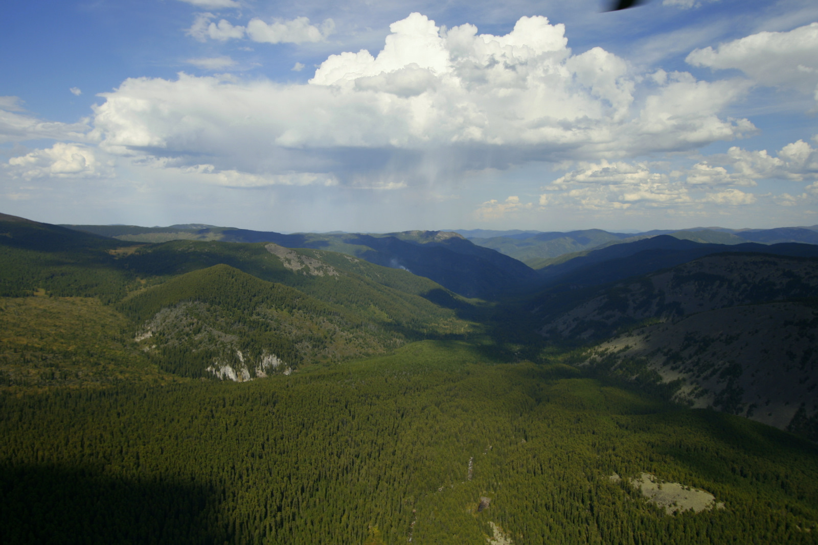 Altai mountains aerial